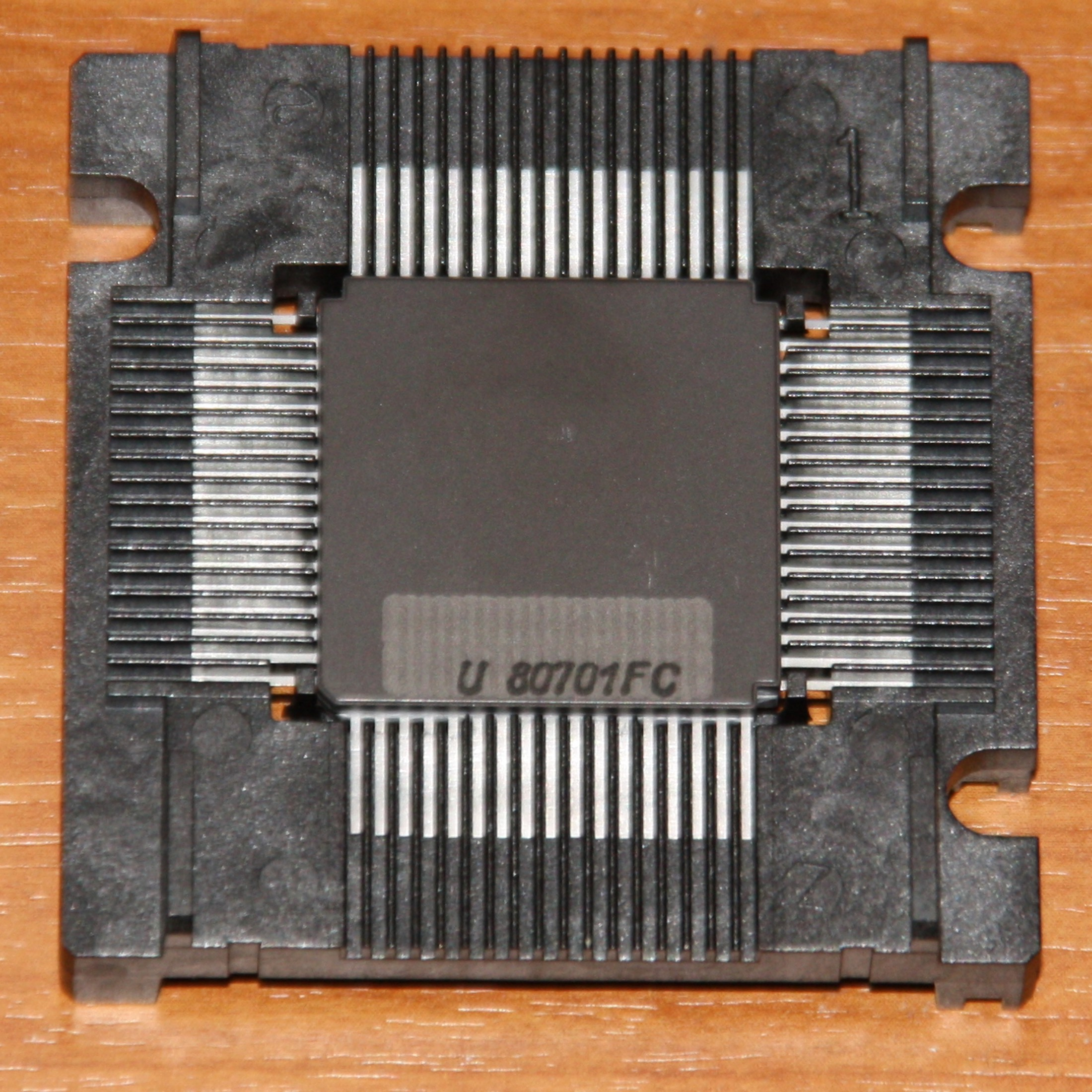 Mikroprozessor KME U80701FC Prototype